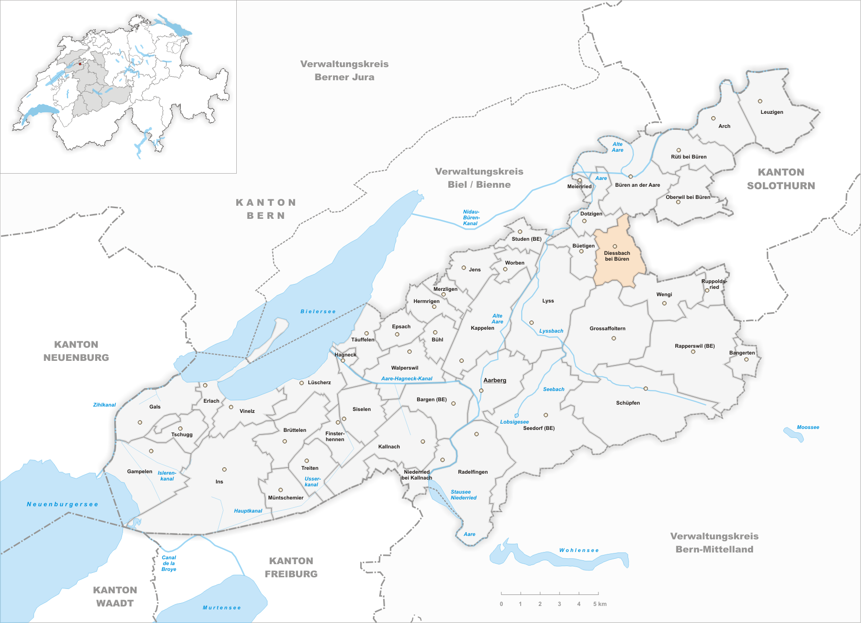 Municipality Diessbach bei Büren